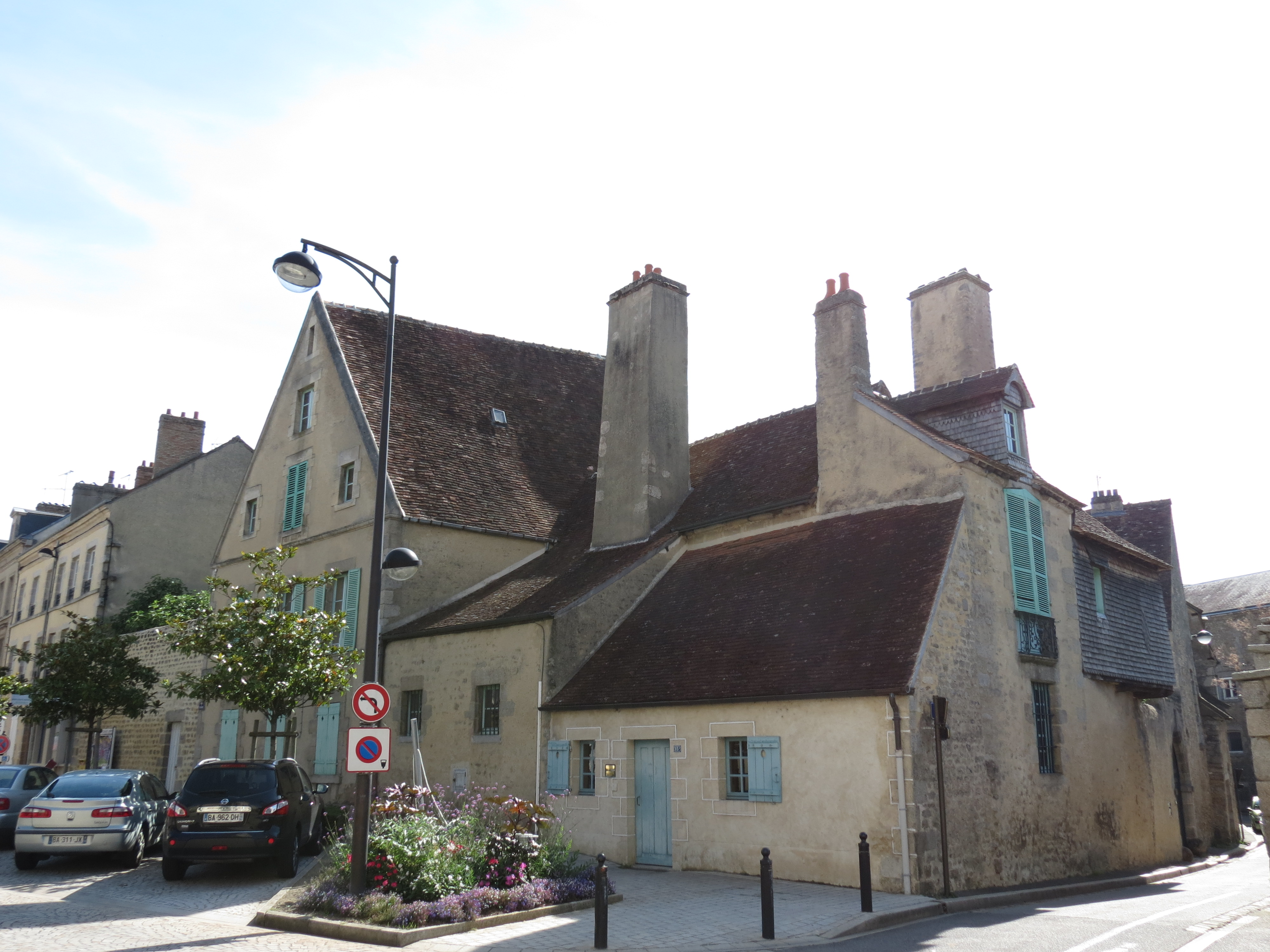 Logis Saint-Léonard, Alençon, Orne, Normandie.